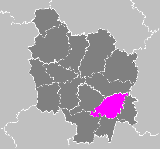 Maps of arrondissements and cantons of France: Arrondissement de Chalon-sur-Saône.PNG (Région Bourgogne)